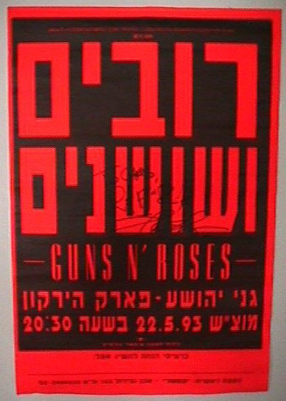 פוסטר הופעת גאנז בישראל